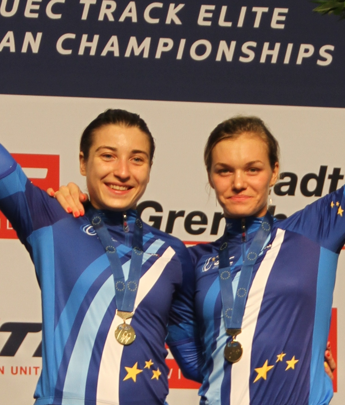 Daria Shmeleva (l.), Anastasiia Voynova, russische Radsportlerinnen, Europameisterinnen im Teamsprint 2015 The making of this document was supported by the Community-Budget of Wikimedia Germany.